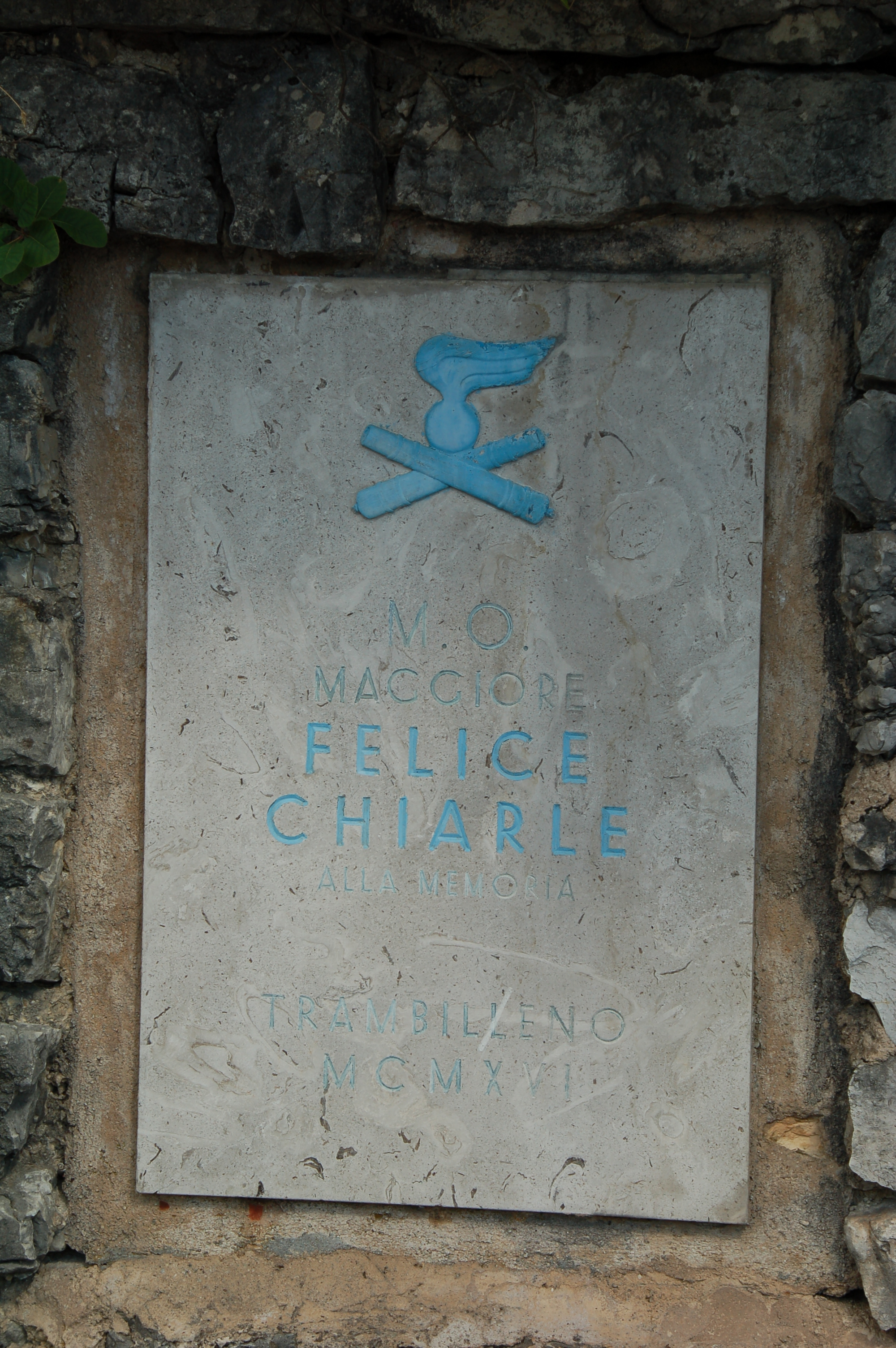 Lapide situata sulla Strada degli Artiglieri a Rovereto